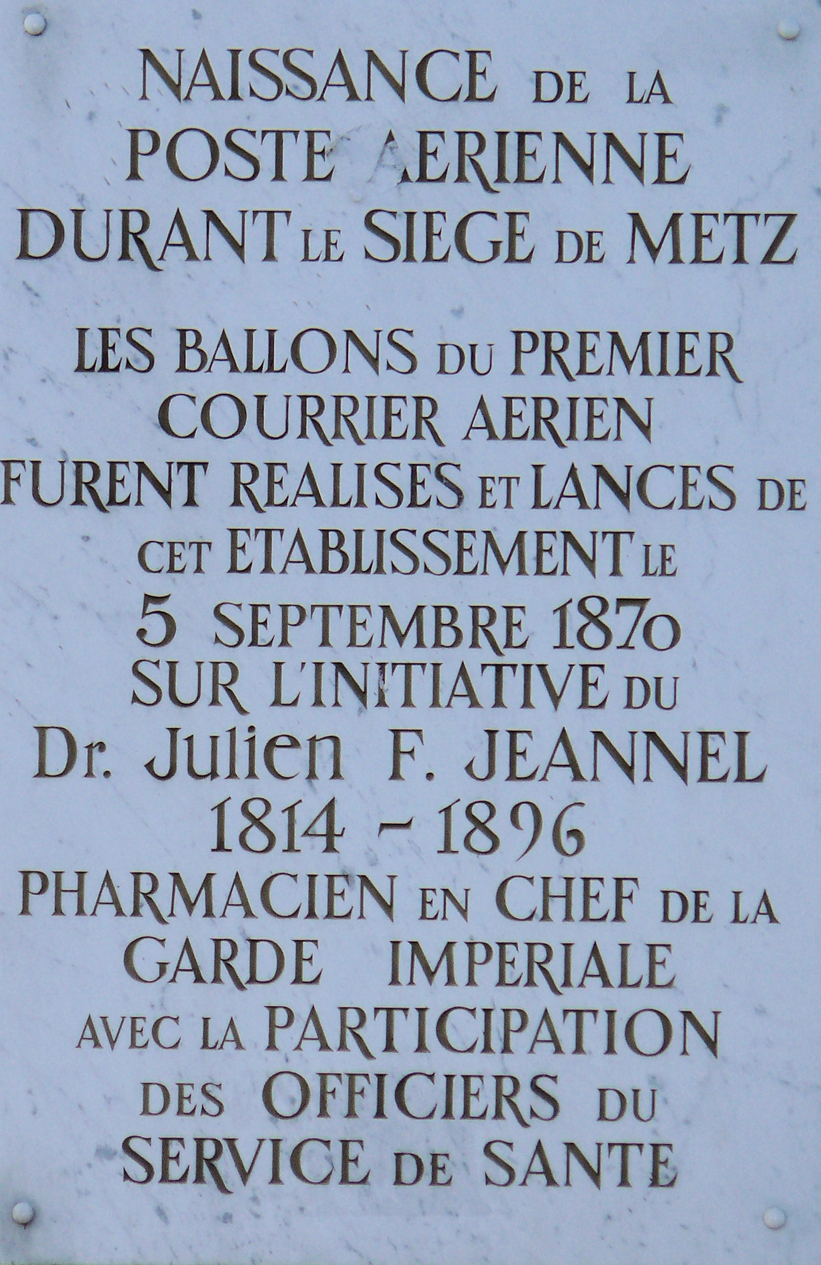 Metz - Hôpital militaire - Plaque commémorative de la poste aérienne pendant le siège de 1870